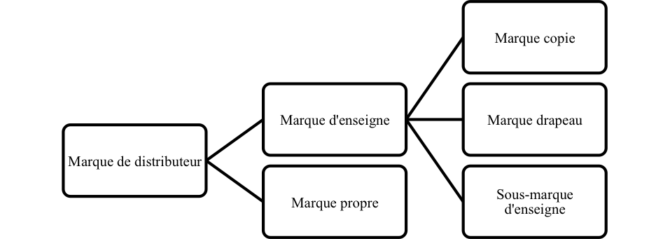 Les marques de distributeurs (illustration)